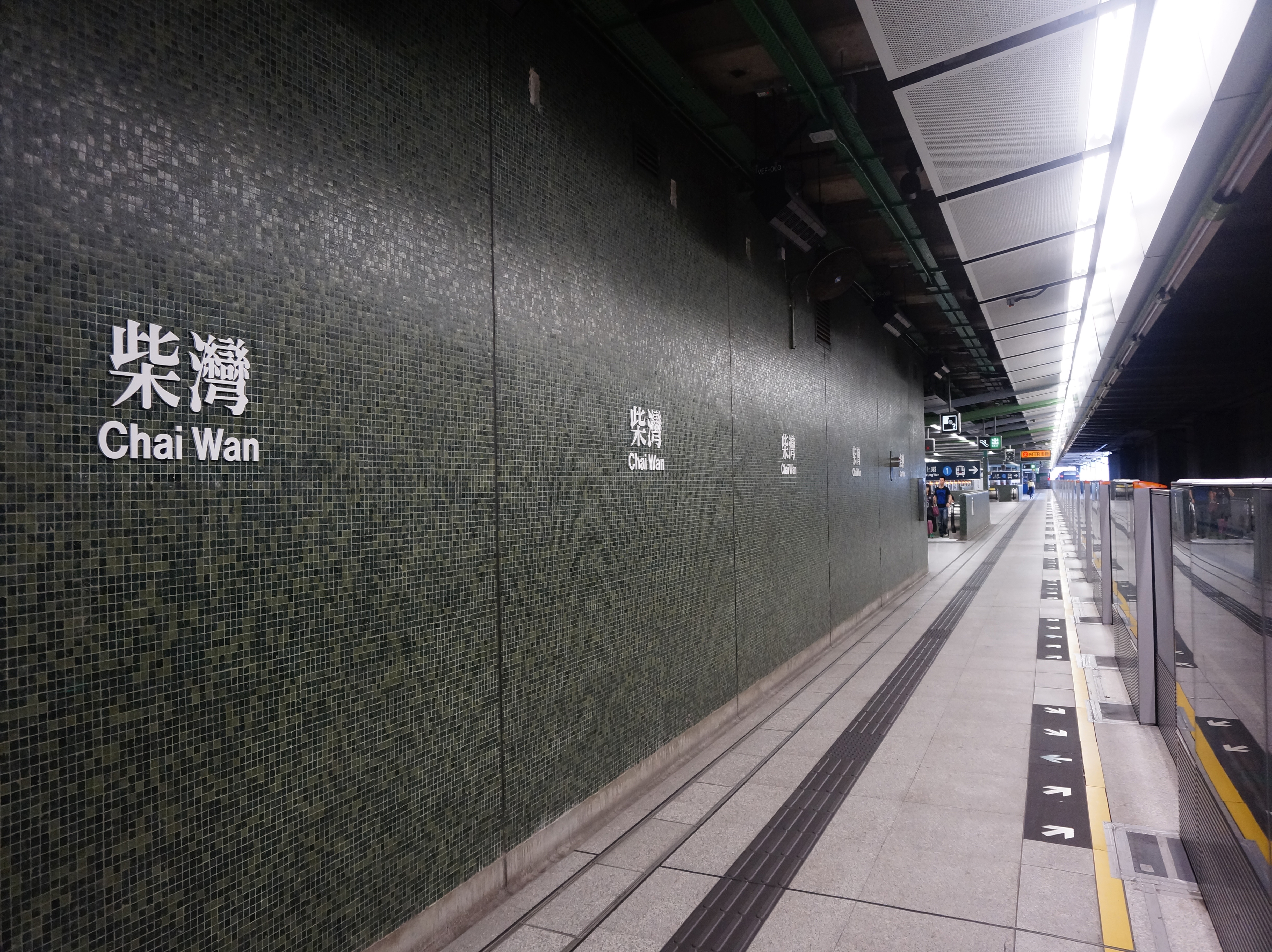 港鐵柴灣站月台